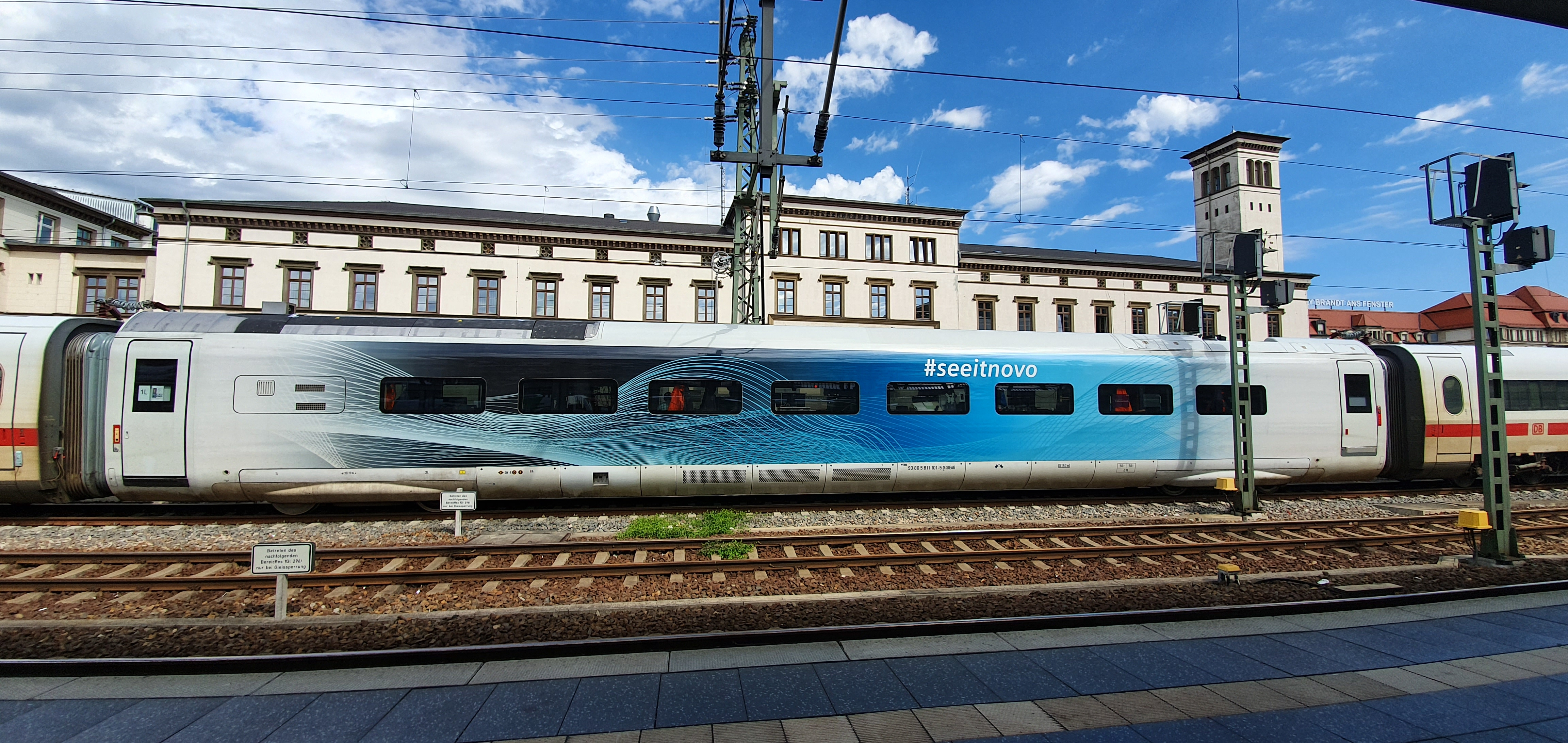 Im Bild ist der erste Modellwagen des Velaro Novo der Firma Siemens im Bahnhof Erfurt Hbf zu sehen.